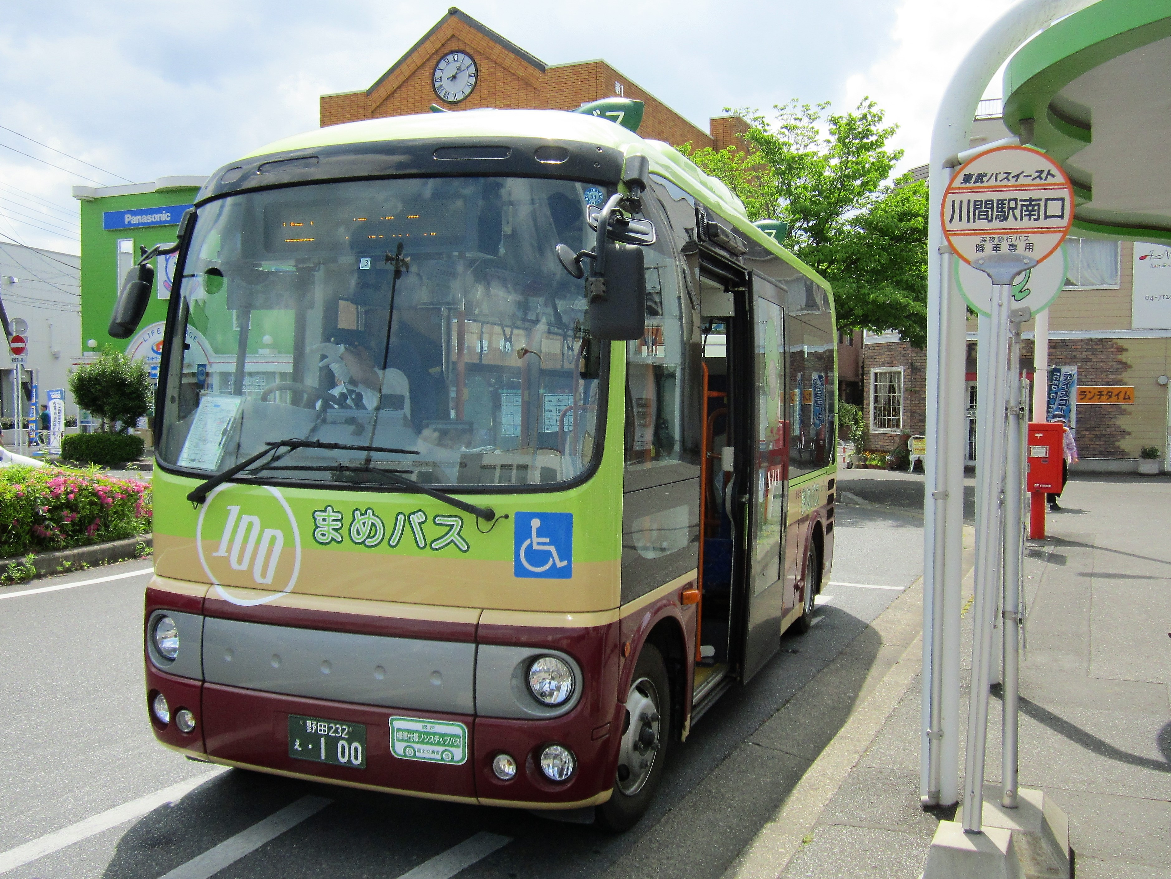 まめバス（茨城急行自動車車両、川間駅南口） Canon PowerShot A2200